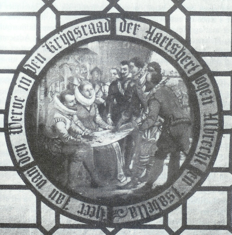 Vitrail représentant Jean III van de Werve au conseil de guerre des archiducs Albert et Isabelle